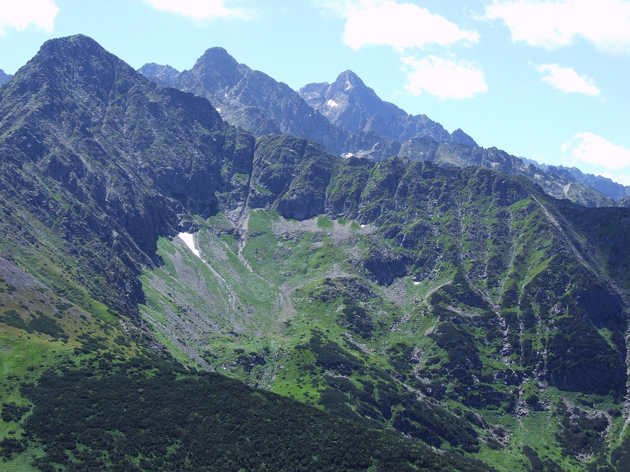 Jagnięcy Szczyt i Jagnięca Grań, pod nimi Jagnięcy Kocioł. U góry, po prawej stronie Kołowy Szczyt i Lodowy Szczyt.